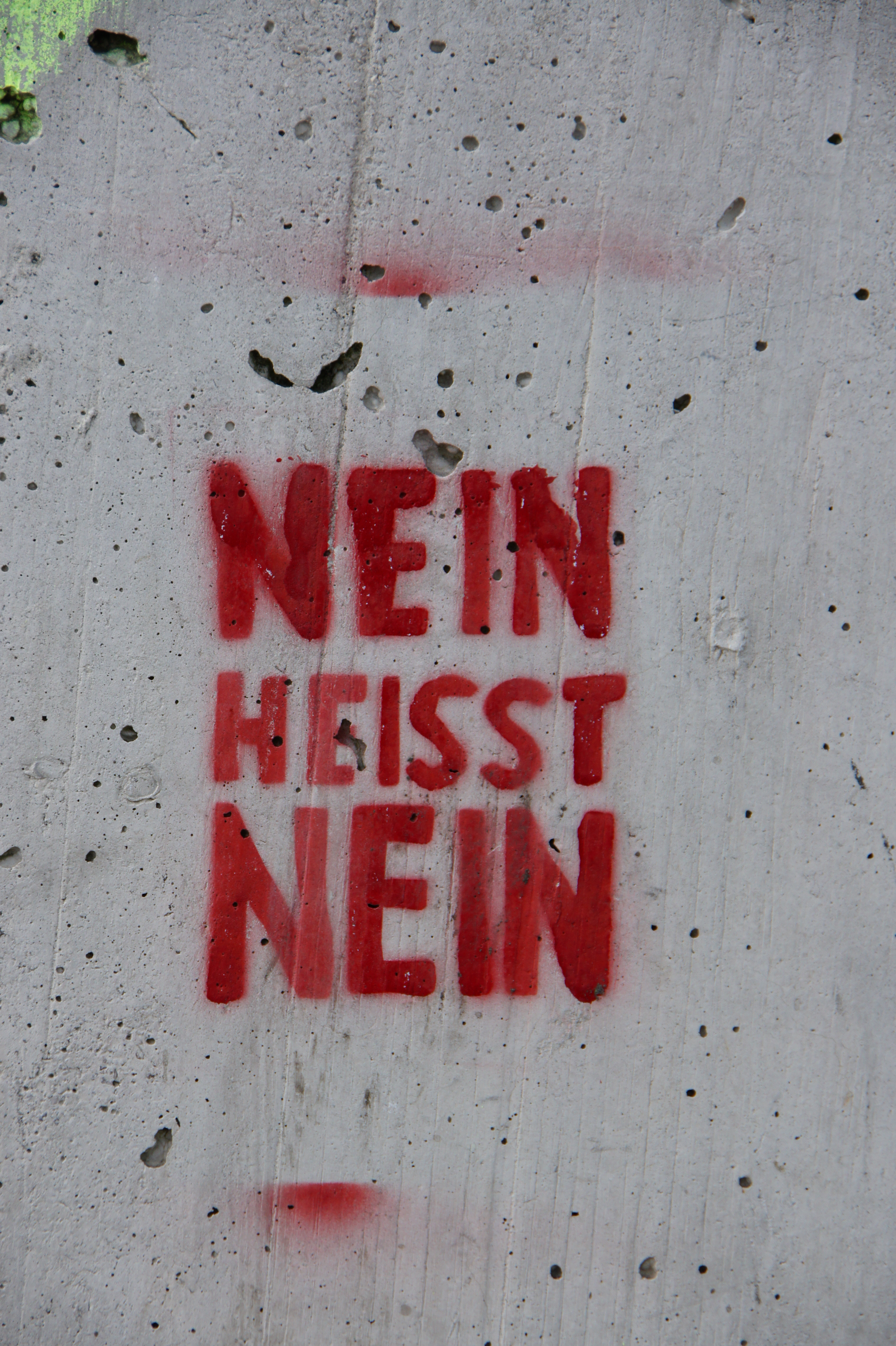 no is no